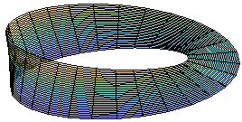 Cinta de Möbius con la siguiente parametrización: x=(1+v/2*cos(u/2))*cos(u) y=(1+v/2*cos(u/2))*sin(u) z=v/2*sin(u/2) Siendo u y v en el intervalo [0,2·pi).